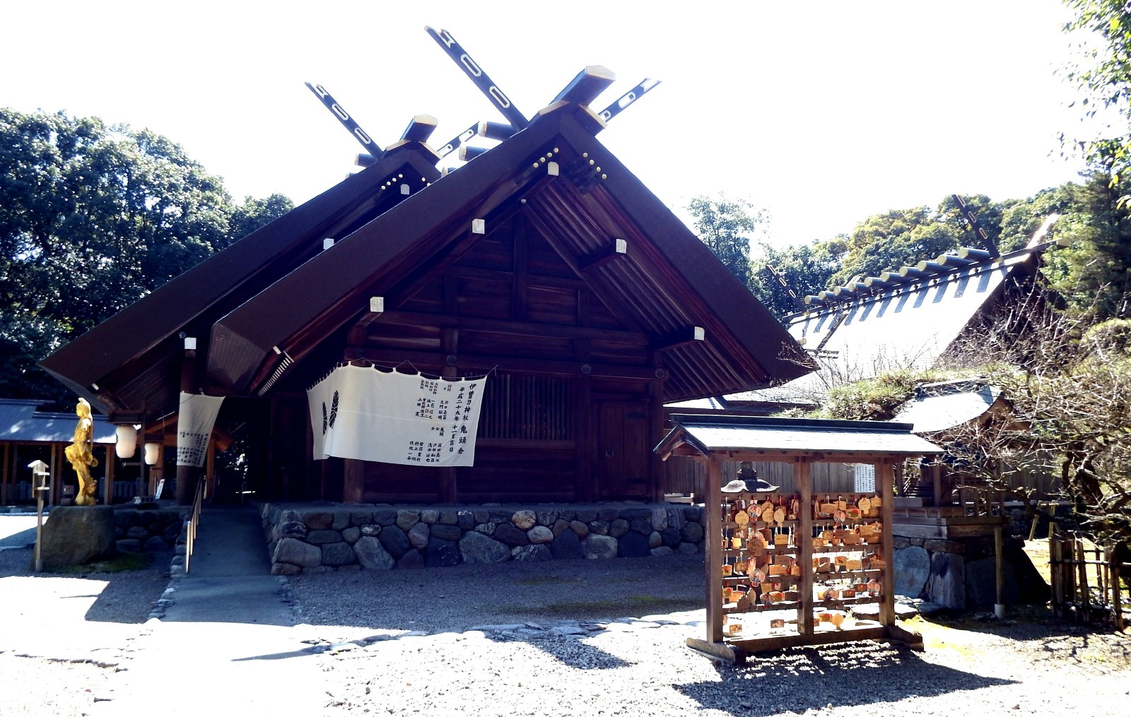 伊曽乃神社 本社